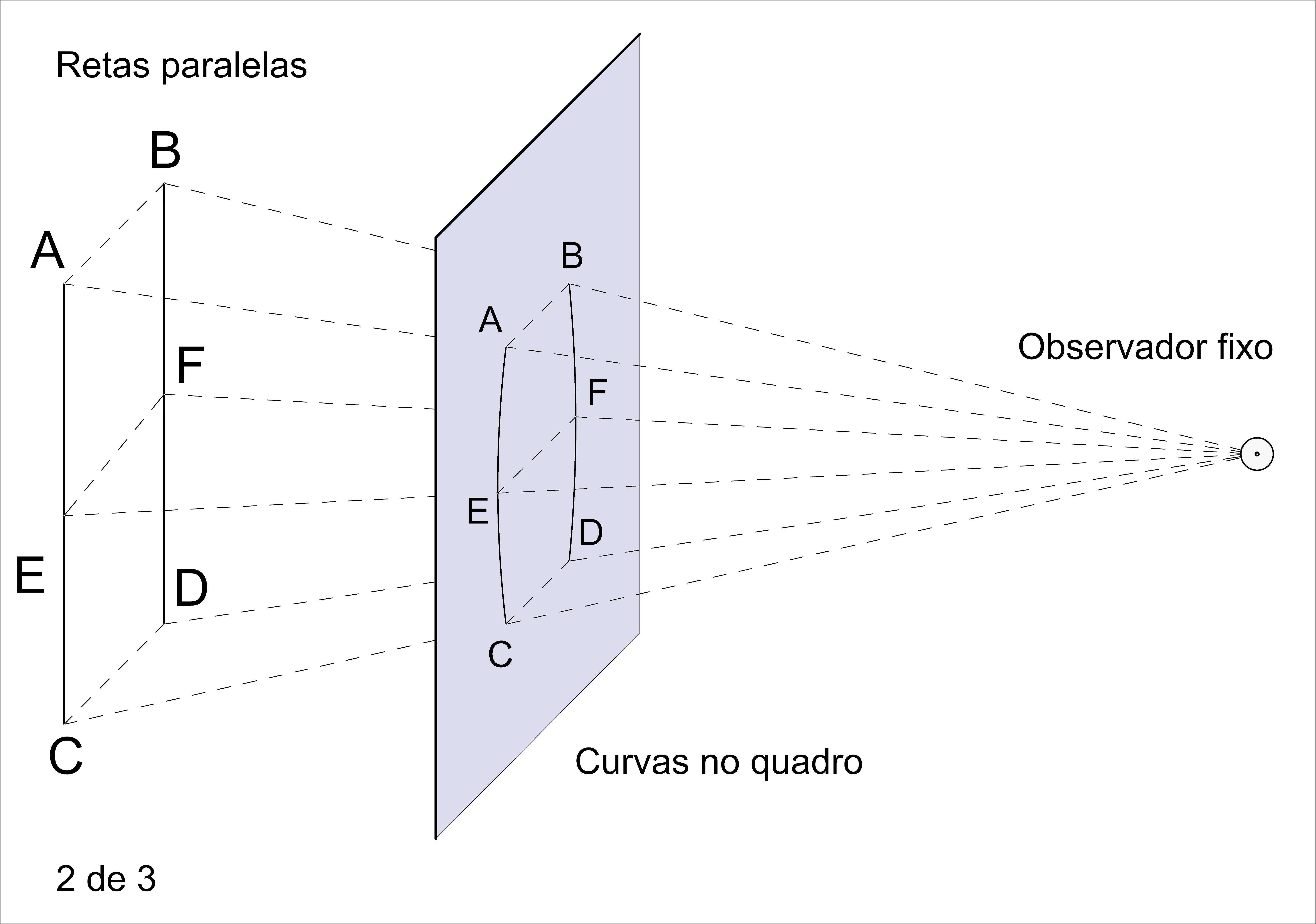 Projeções curvas a partir de um observador fixo